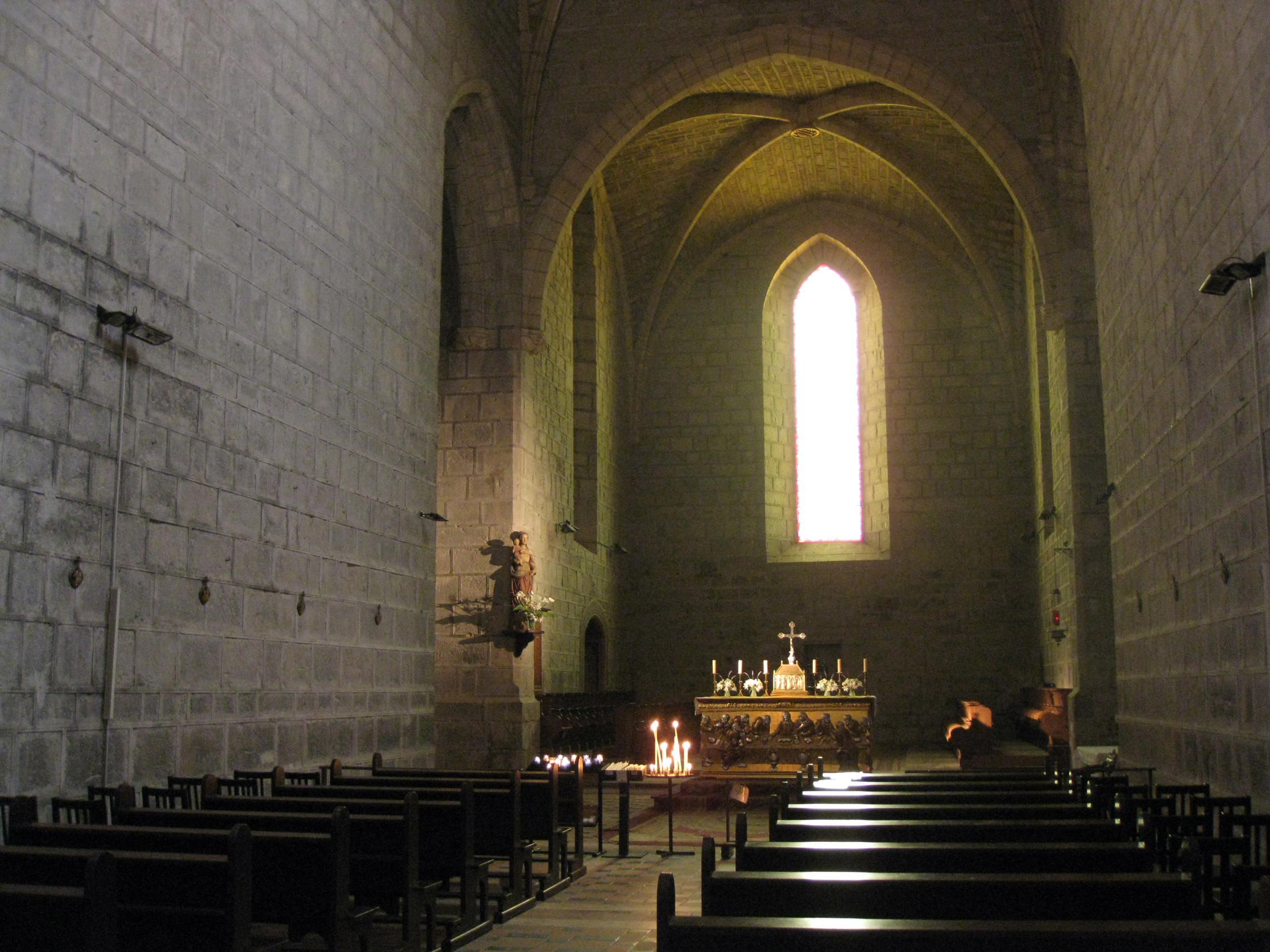 Antiga abadia Sainte-Marie d'Orbieu (La Grassa)